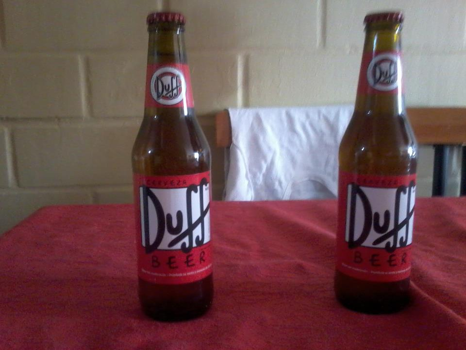 Replica de la cerveza duff